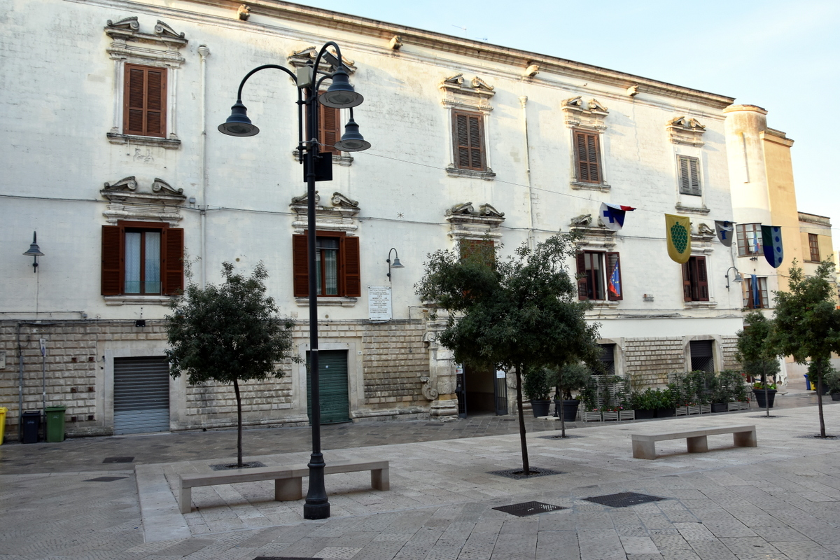 Piazza della Repubblica. Palazzo del Principe. This is a photo of a monument which is part of cultural heritage of Italy.